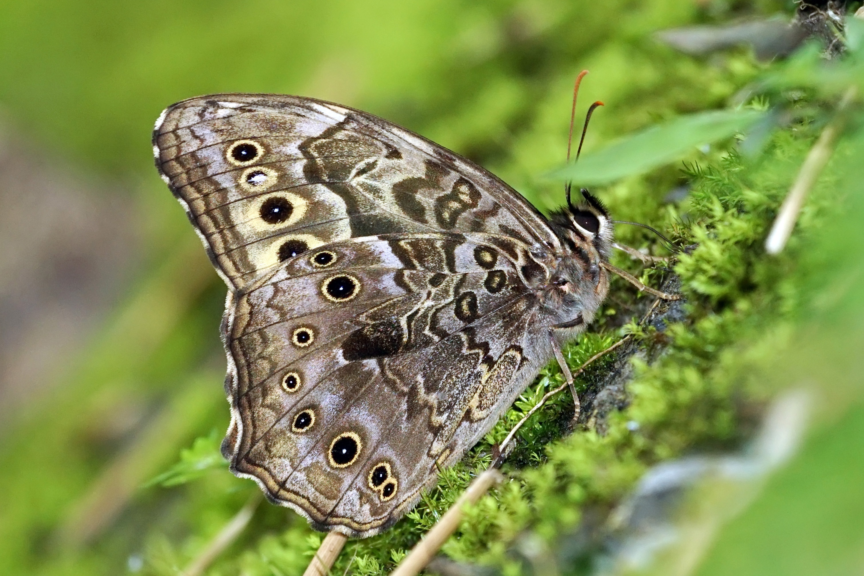 布氏蔭眼蝶 Neope bremeri taiwana